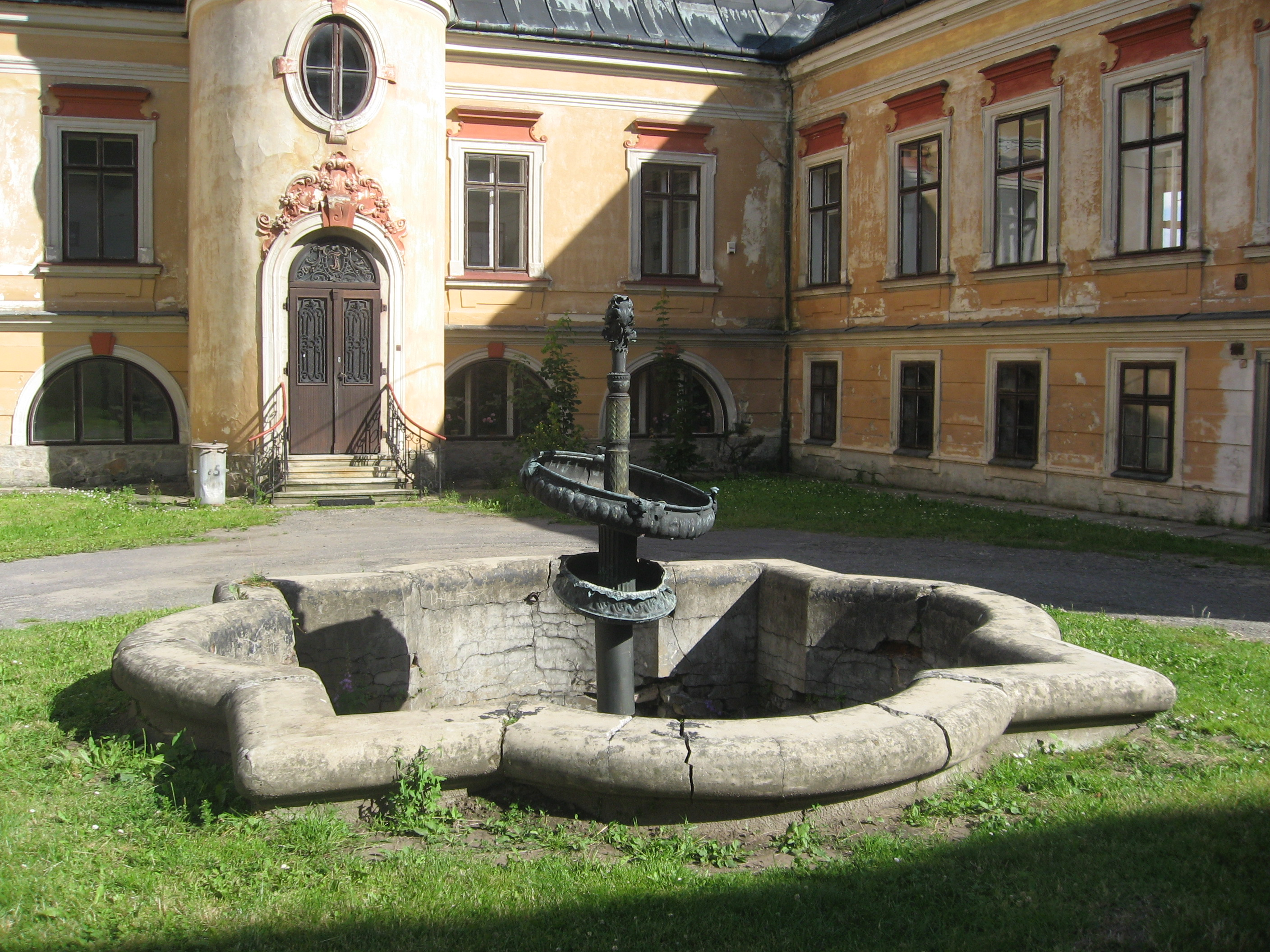 Větrný Jeníkov, kašna u zámku